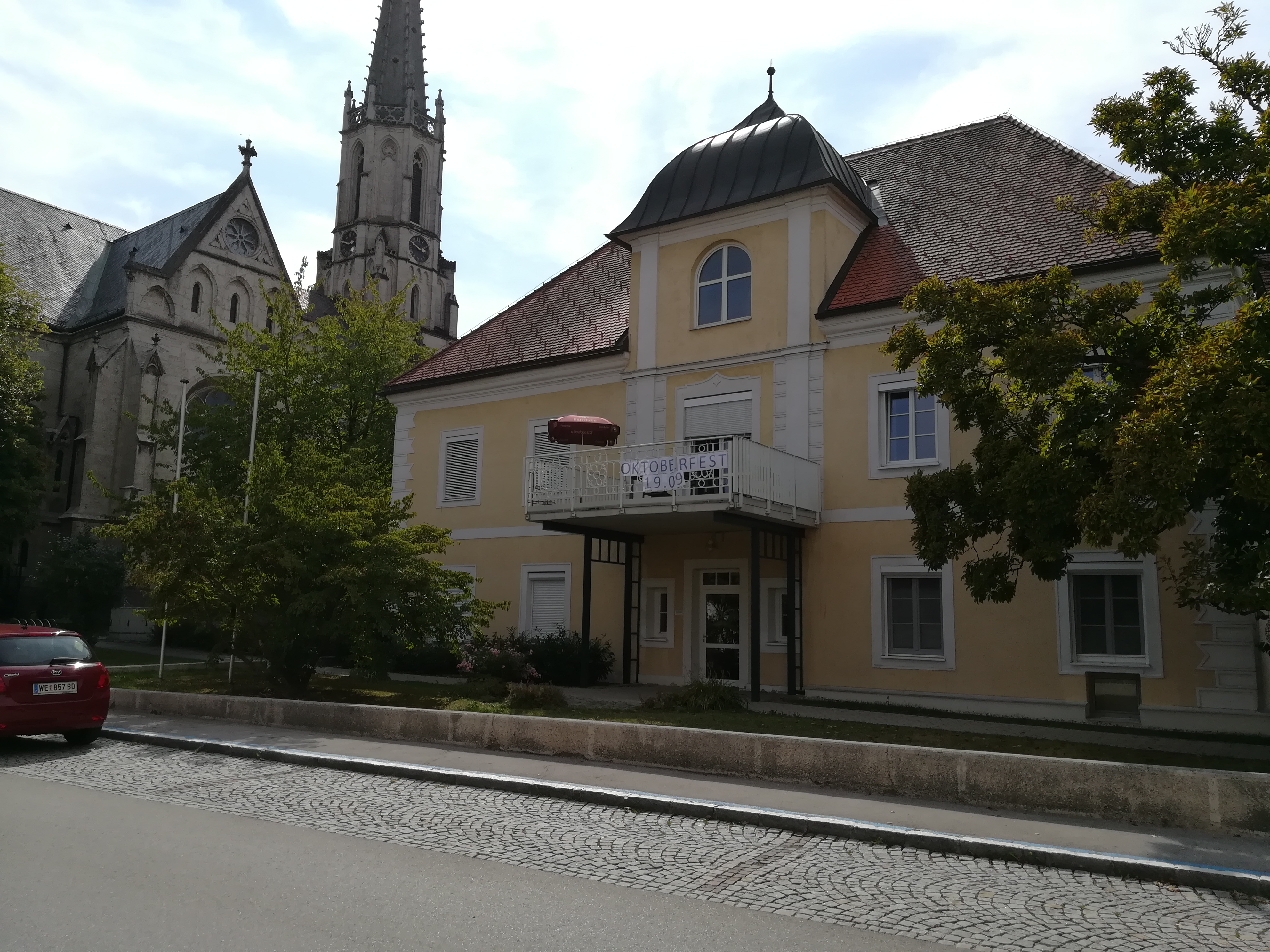 Schloss Hall (Straßenseite)